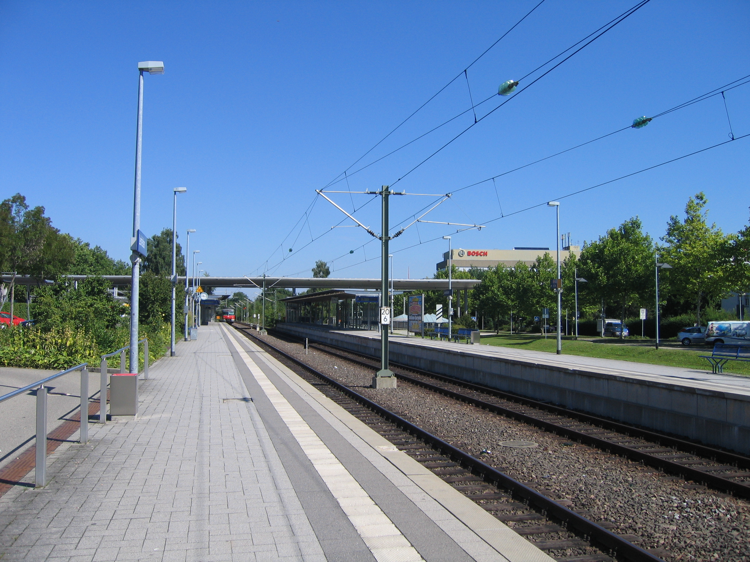 Haltepunkt Leinfelden